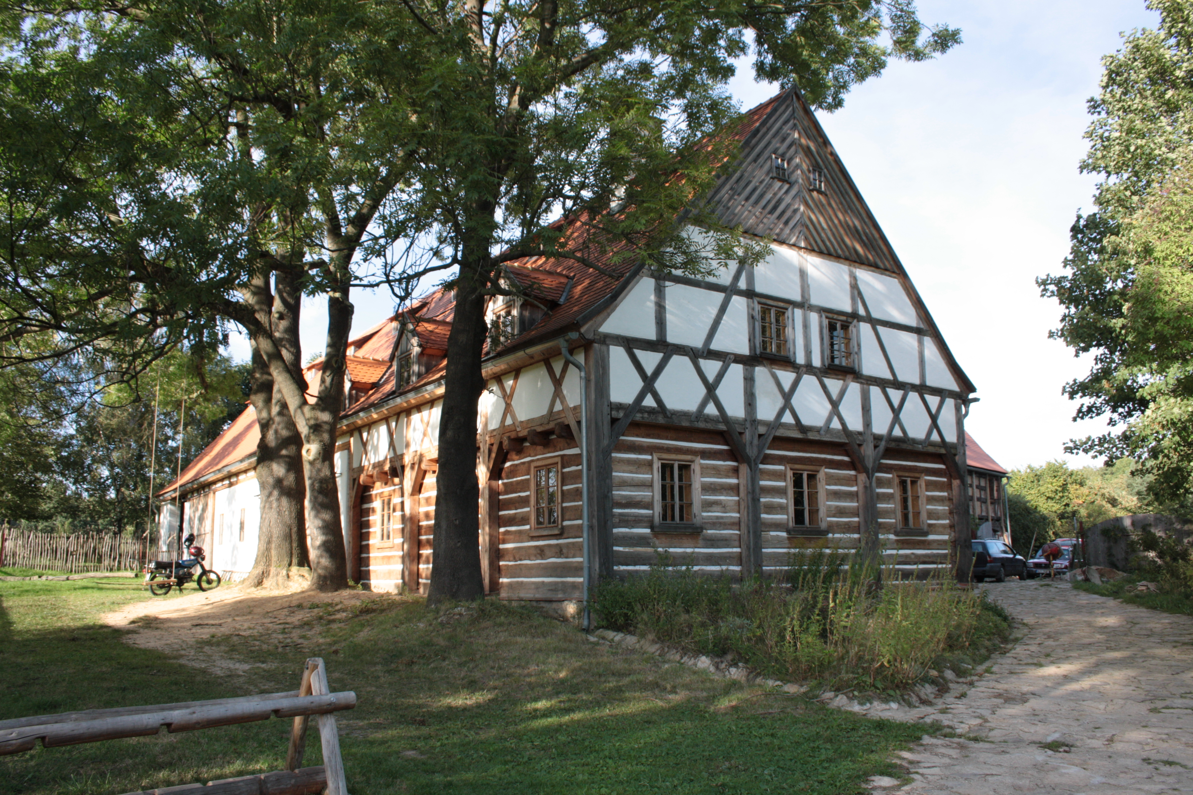 Dům číslo popisné 12 v Jindřichovicích pod Smrkem (pohled od jihozápadu).